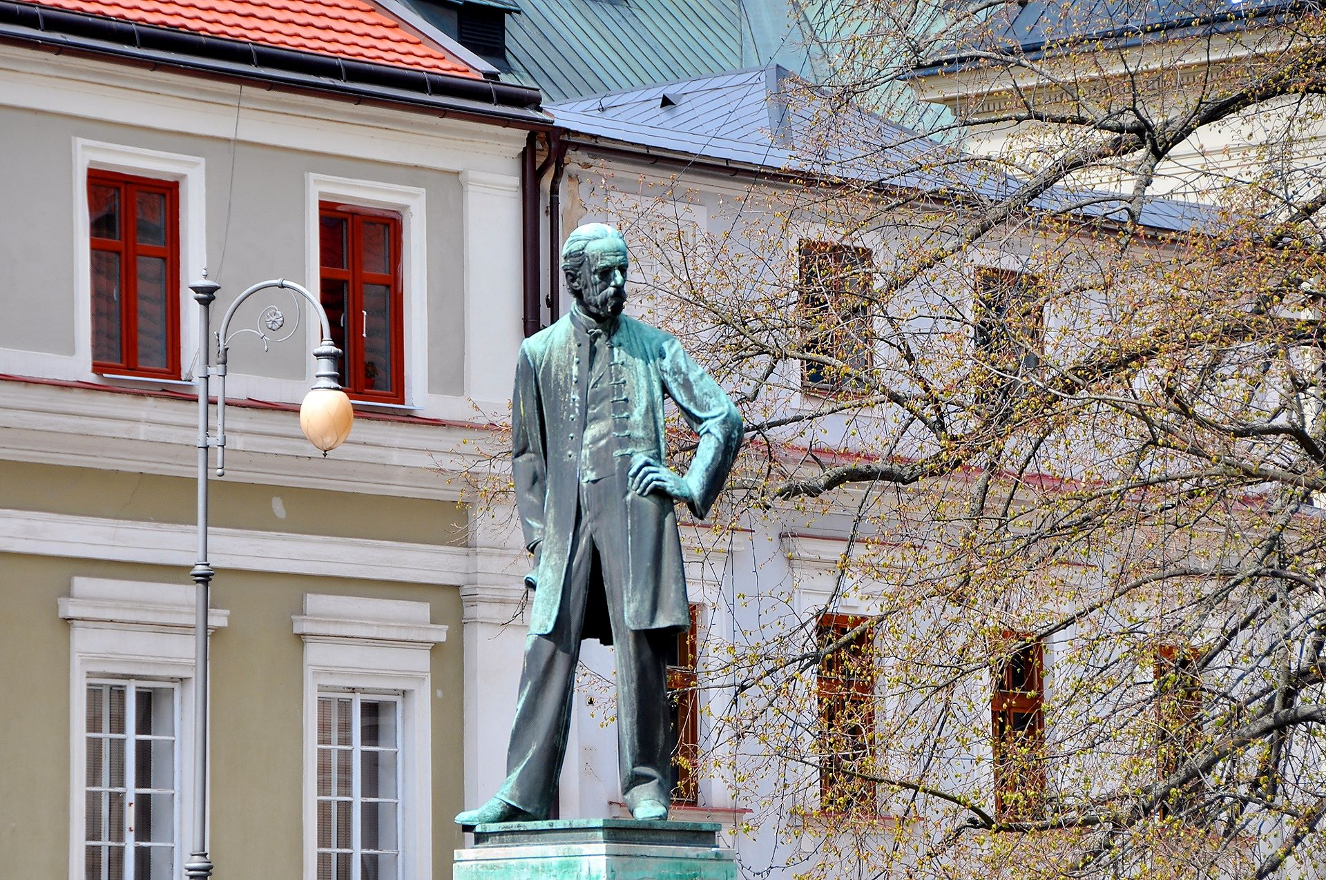 Litomysl